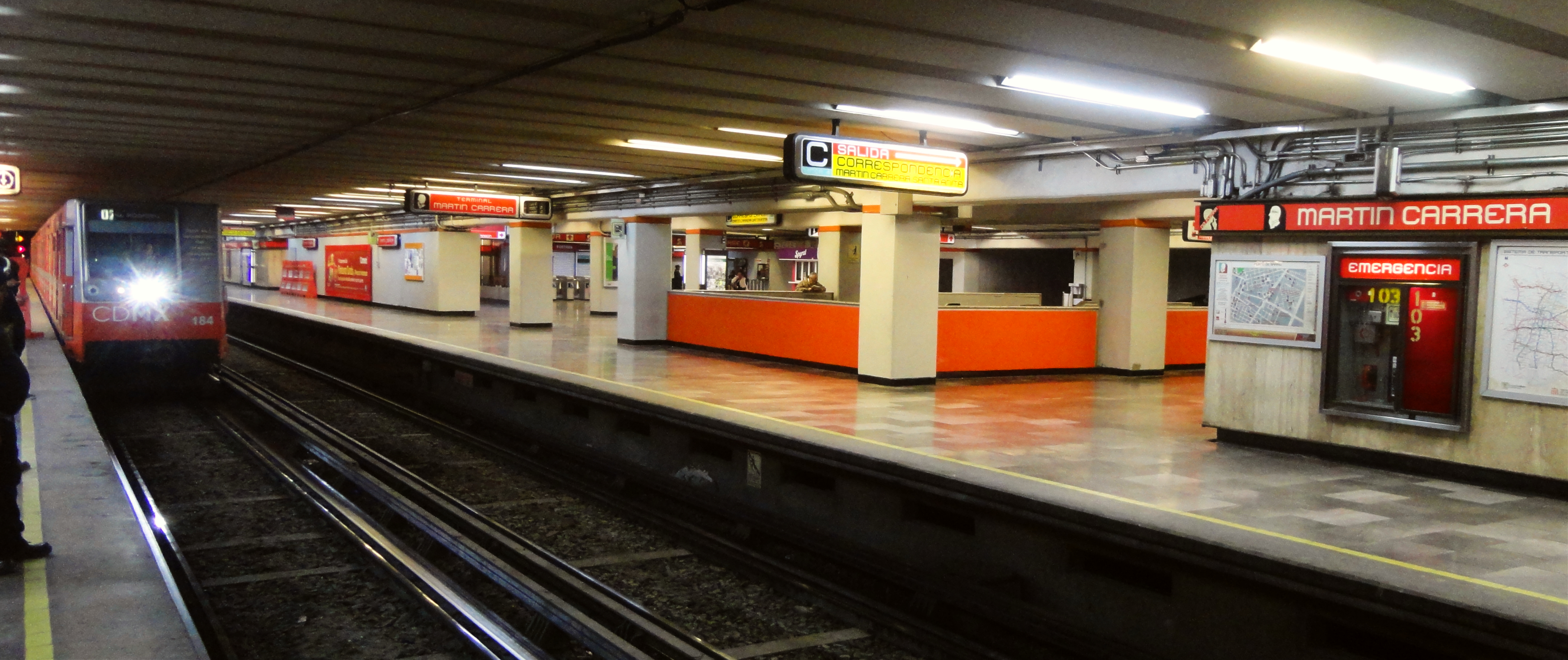 Estación Martín Carrera - Línea 6 - Metro de la Ciudad de México